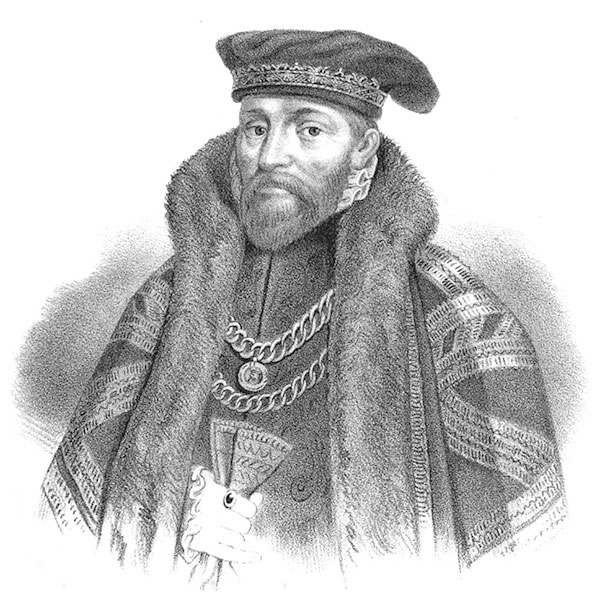 Klas Kristersson (Horn) (1517-1566)